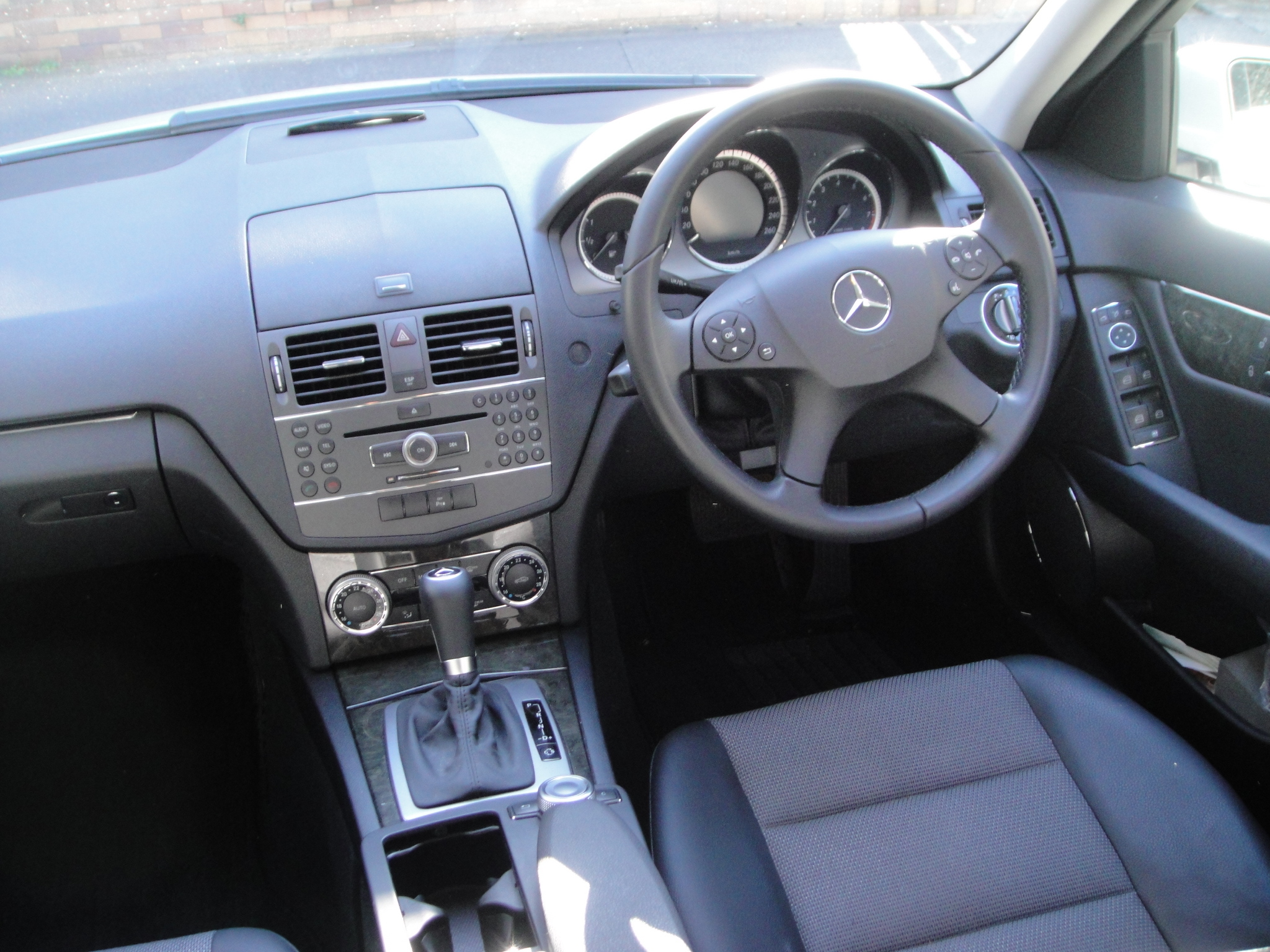 メルセデス・ベンツ W204 前期型車内